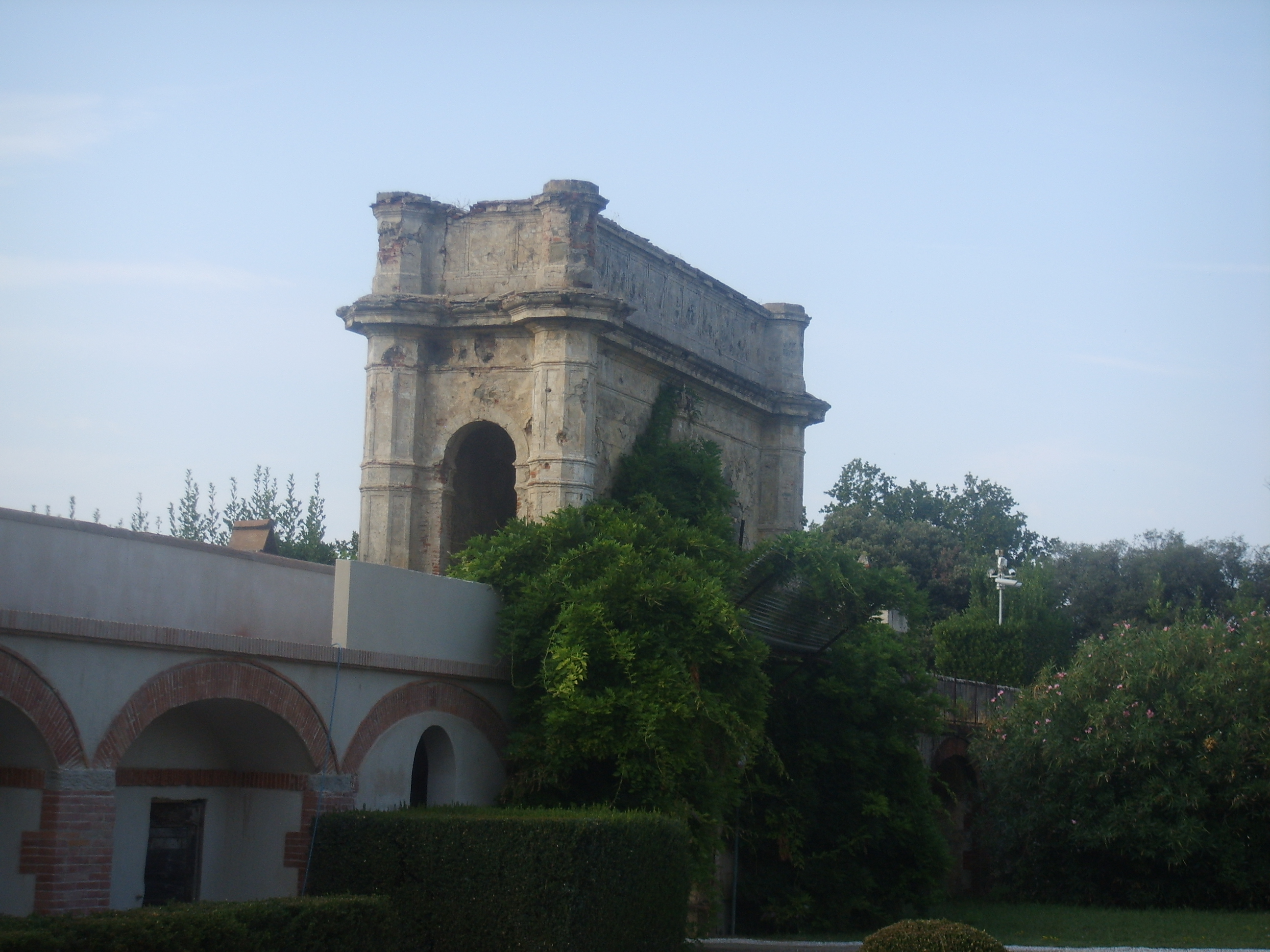 Poggio a Caiano Villa outside view in Poggio a Caiano, Italy